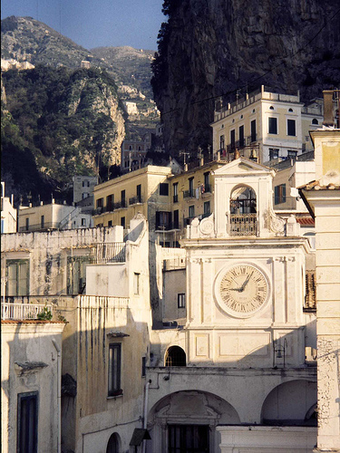 Atrani